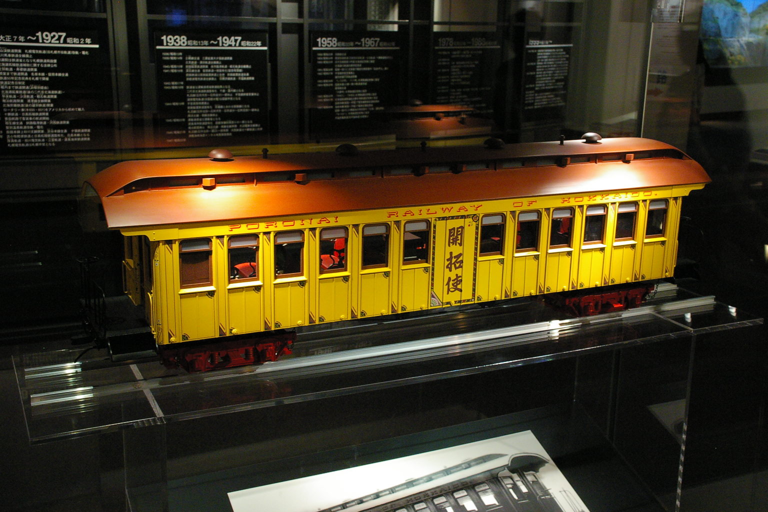 Kaitakushi gou in Otaru synthesis museum.